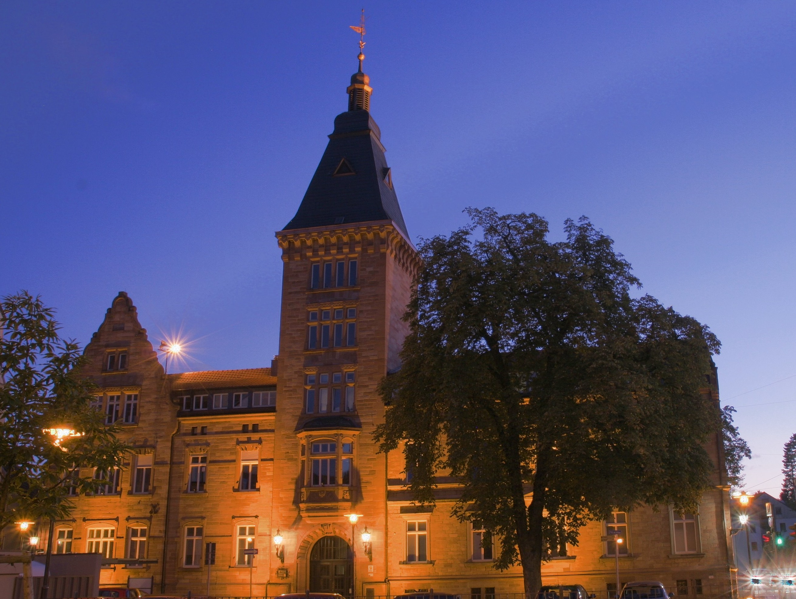 Rathaus im Saarbrücker Stadtteil Dudweiler